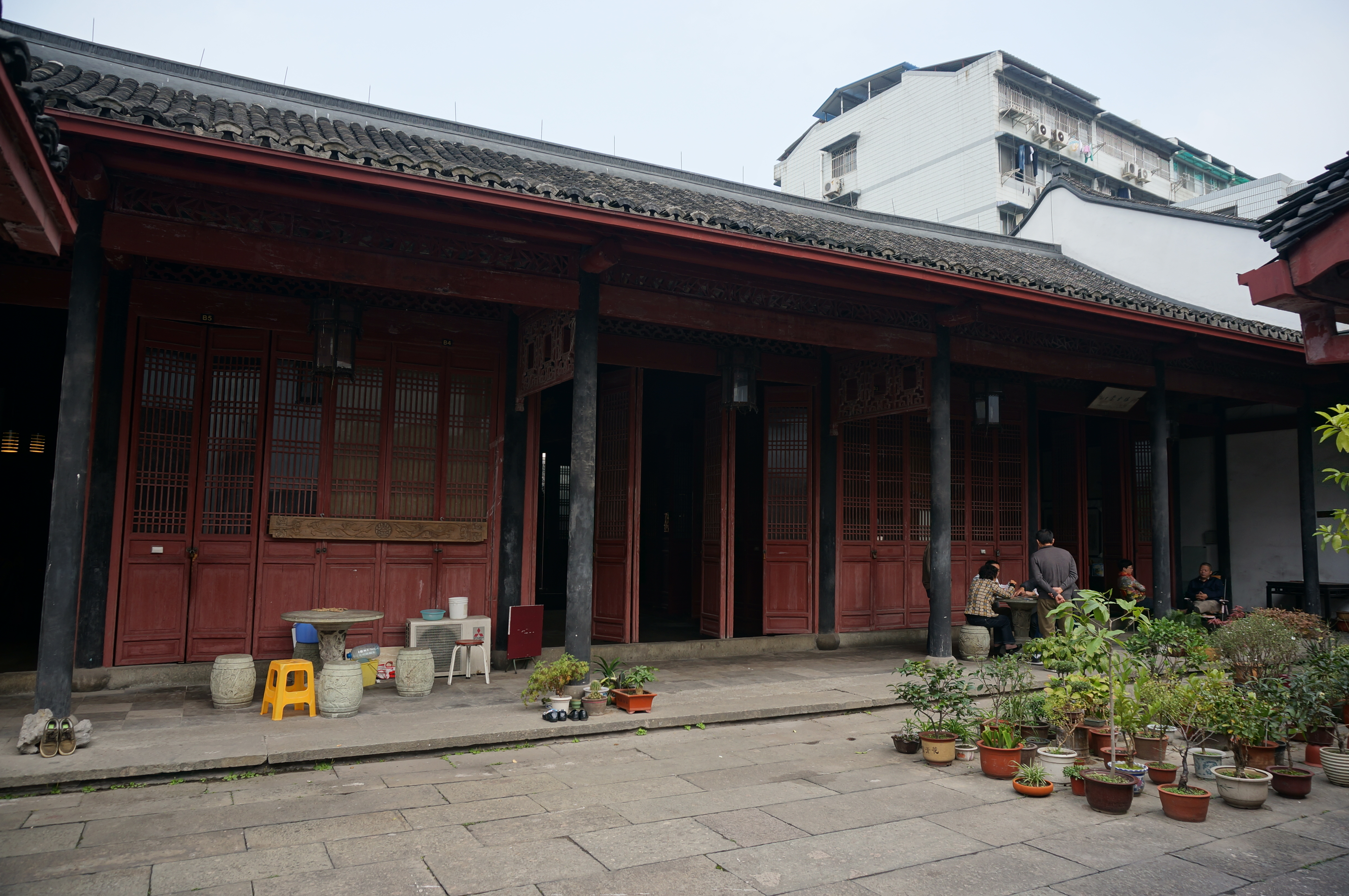 杭州岳官巷吴宅（吴振棫故居），载德堂，南面。